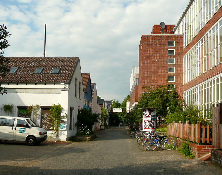 Innenhof des Faustgeländes Hannover